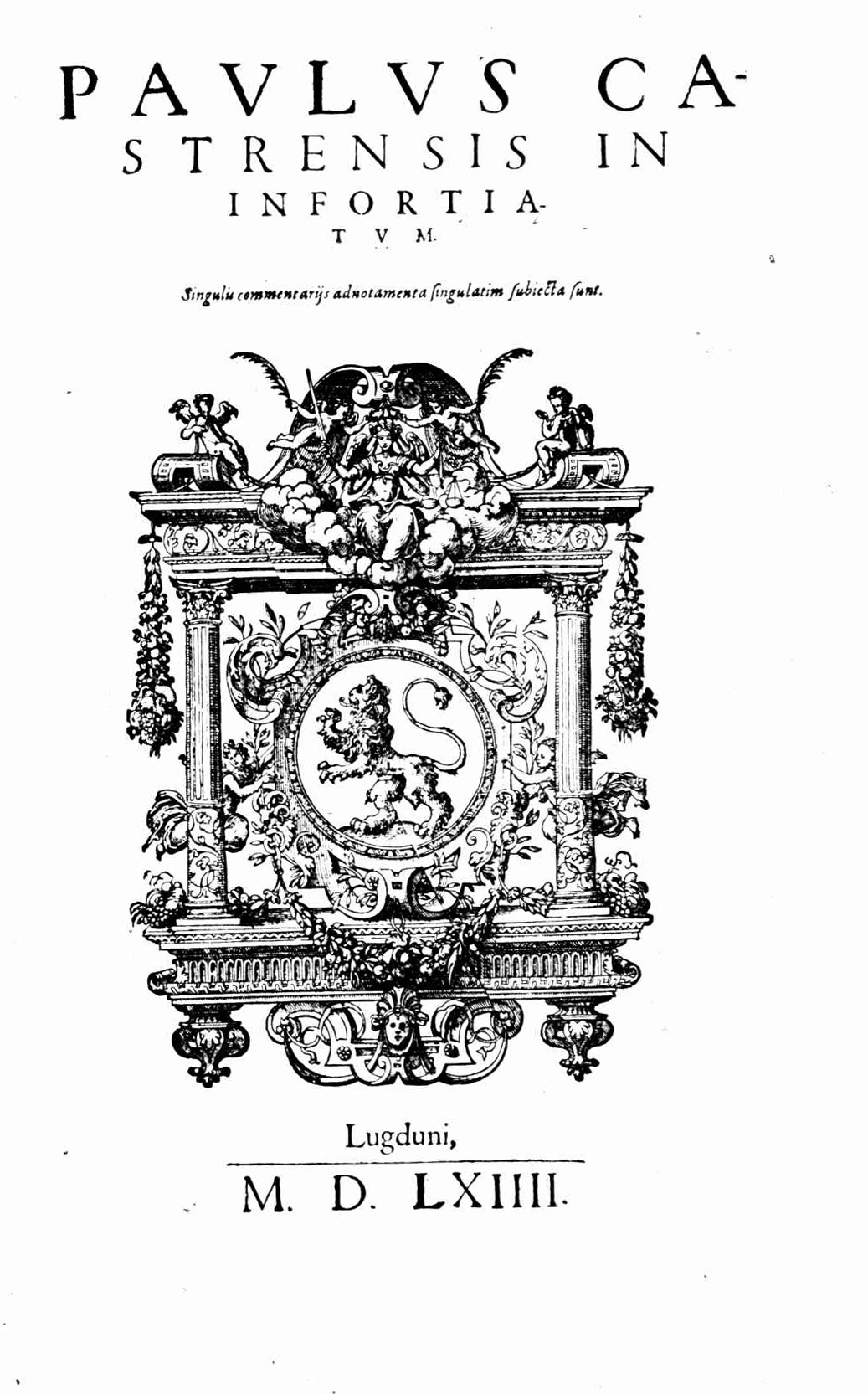 Frontespizio